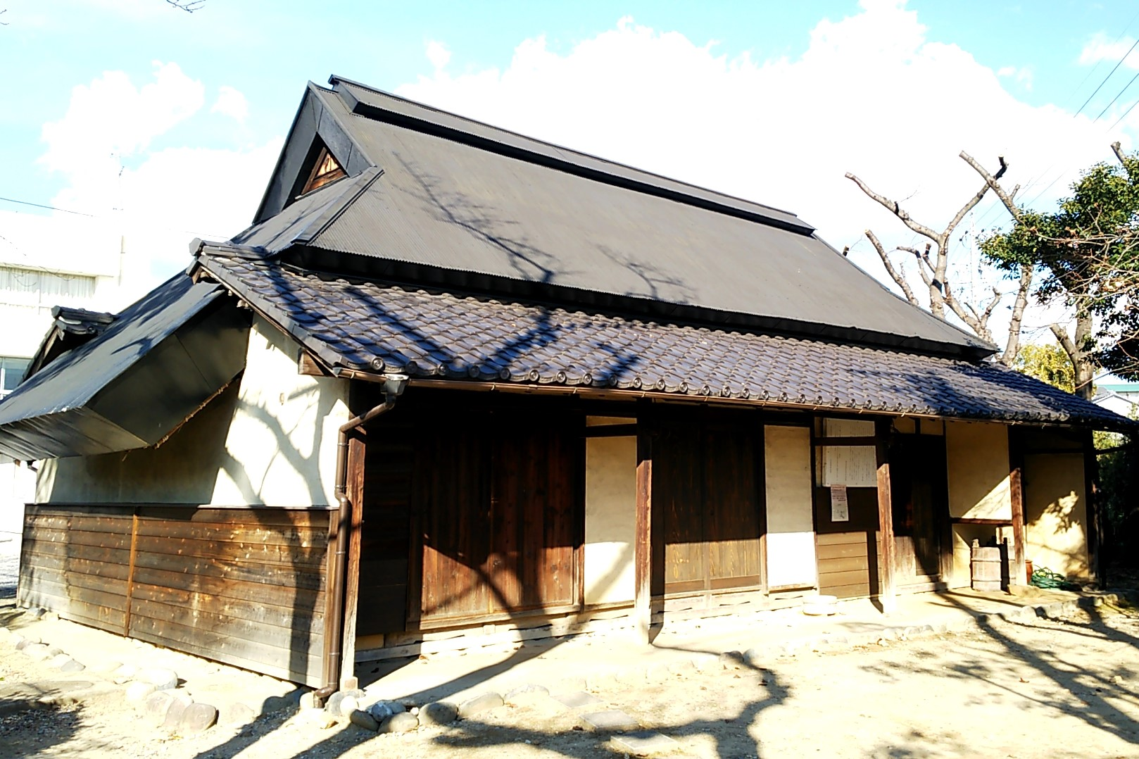 春日井市立中央公民館。